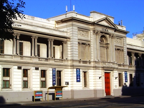 Fachada del Instituto Tecnológico de Buenos Aires (ITBA)